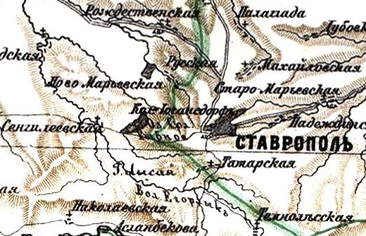 Фрагмент Карты Кавказского края 1869 года (из Подробного атласа Российской империи, изданного картографическим заведением А. А. Ильина в 1871 году)